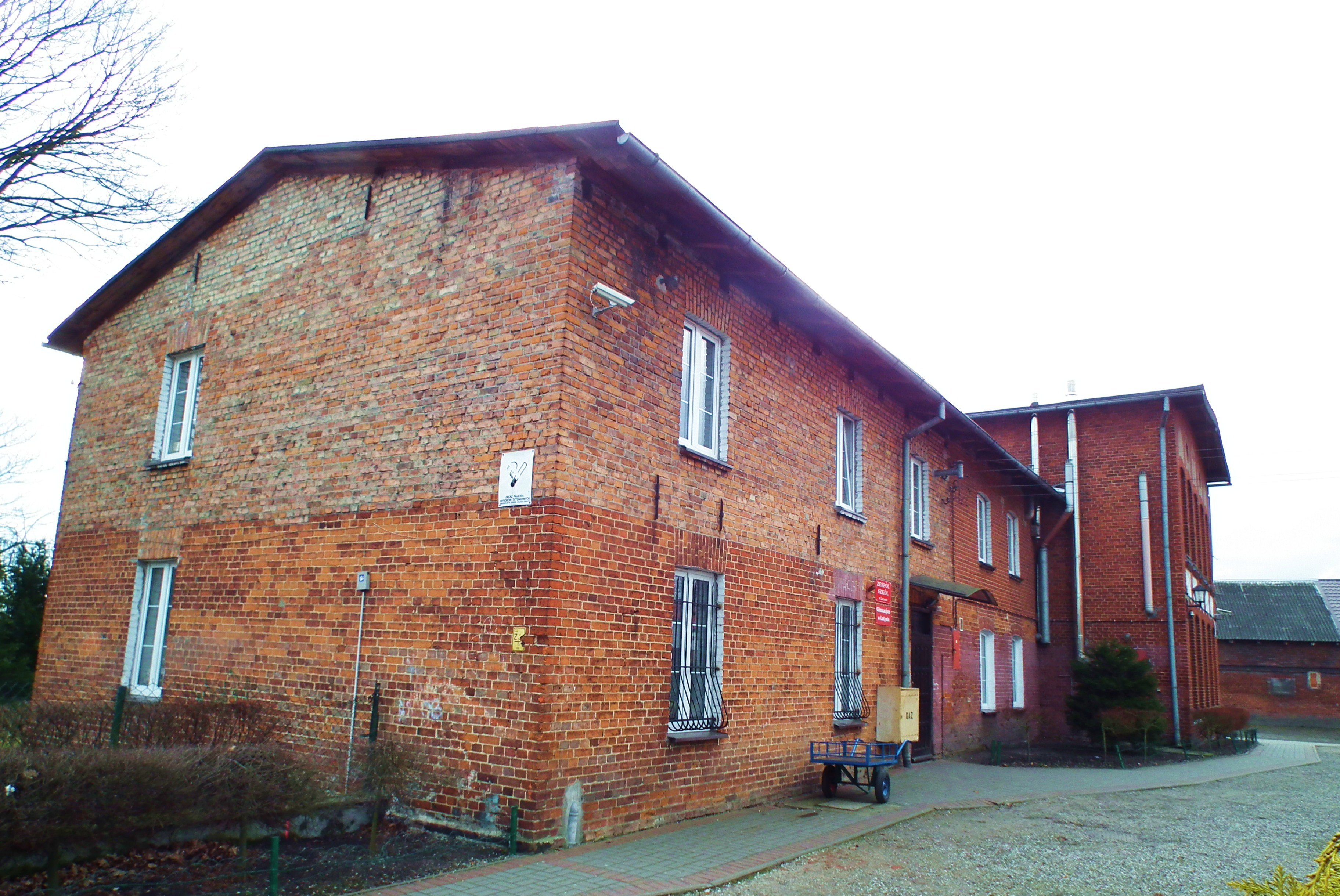 Lotyń. Zabudowania centrum wsi. Stary budynek szkolny.